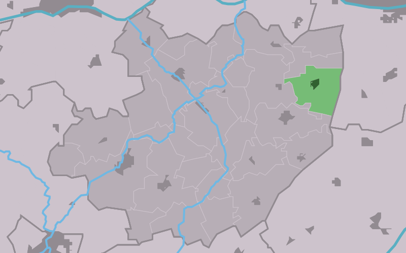 Kaartsje fan himrik fan Weidum